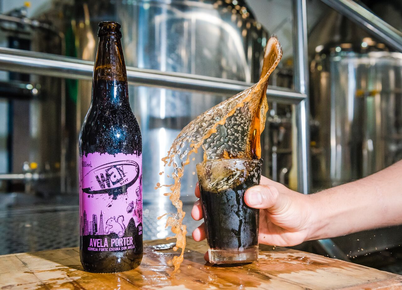 Avelã Porter